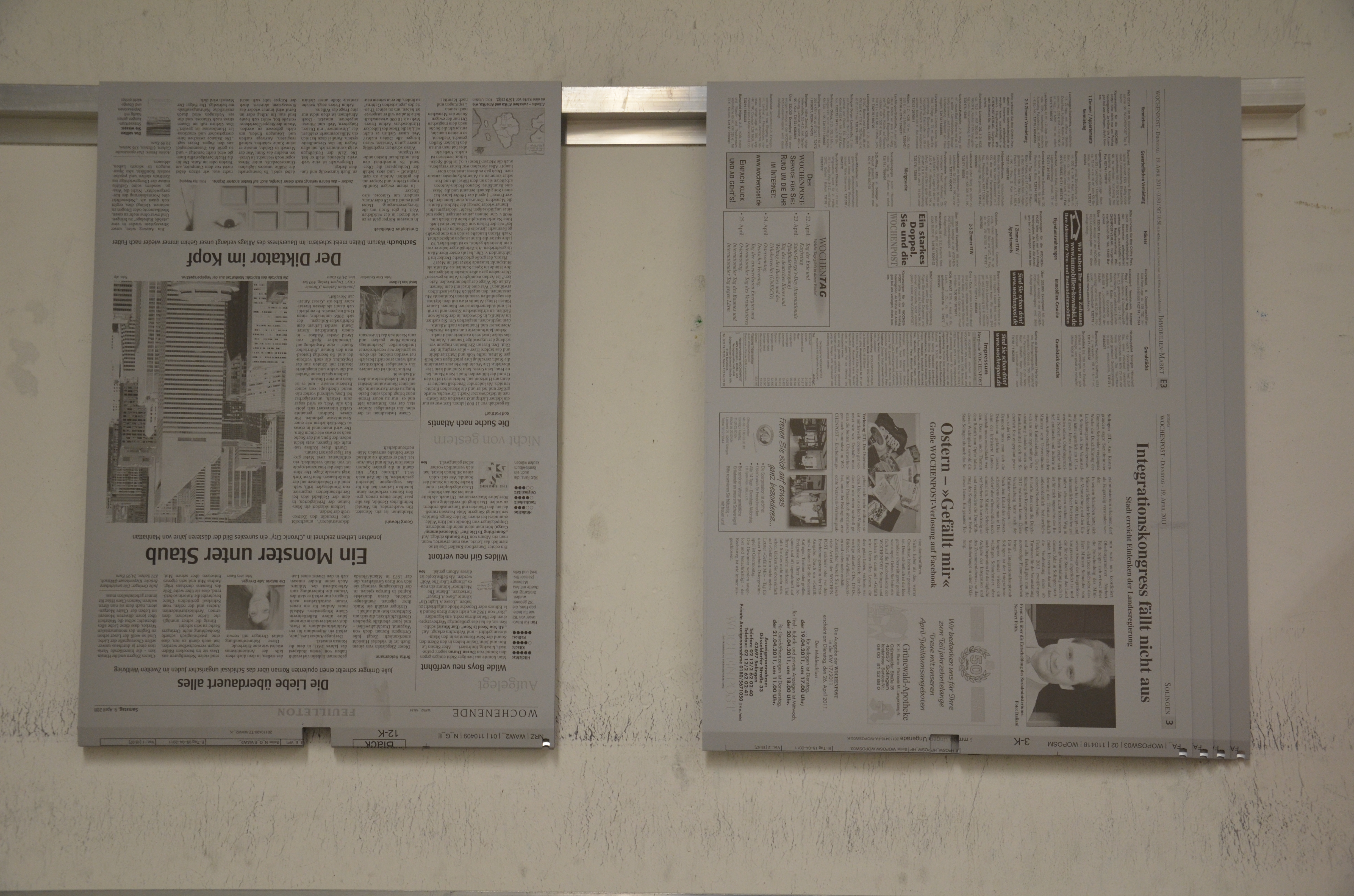 Druckhaus der WAZ Mediengruppe in Essen Plattensätze (links Schwarz, rechts Vierfarbdruck)